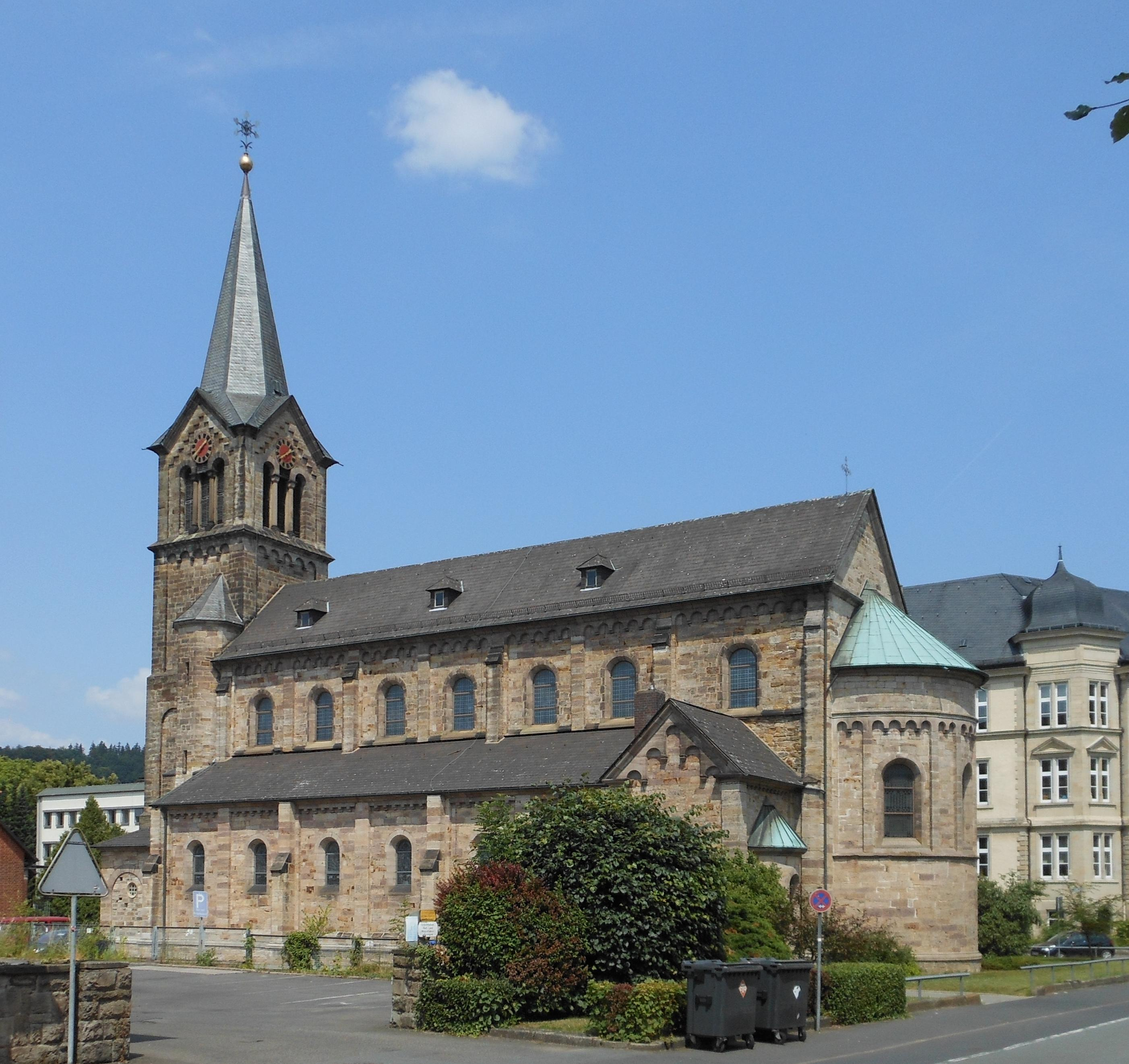 Hann. Münden, kath. Kirche St. Elisabeth